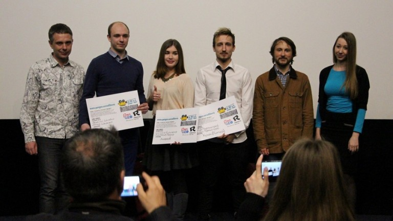 Организаторы и победители 1 этапа Международного видео-марафона "За 80 у.е. вокруг Евро"